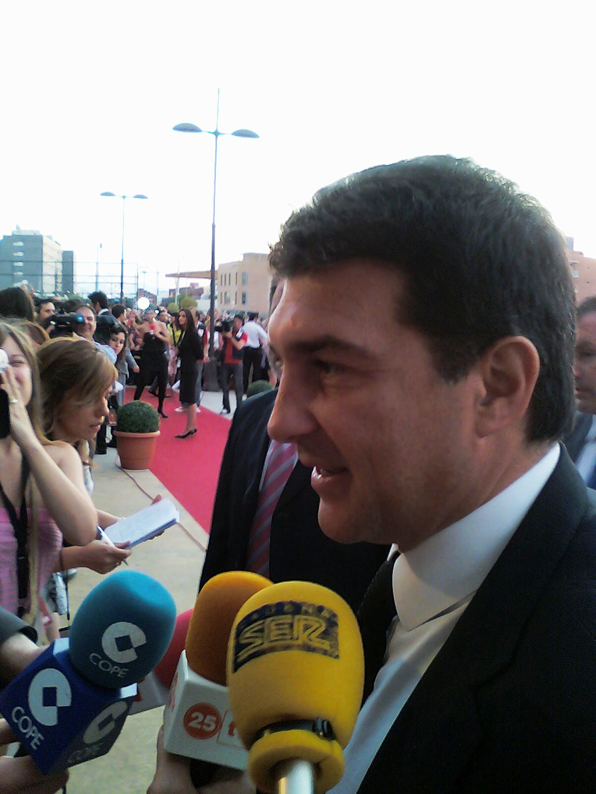 Joan Laporta en la entrega de los premios Micrófonos de Oro 2009 en la ciudad de Ponferrada (León)